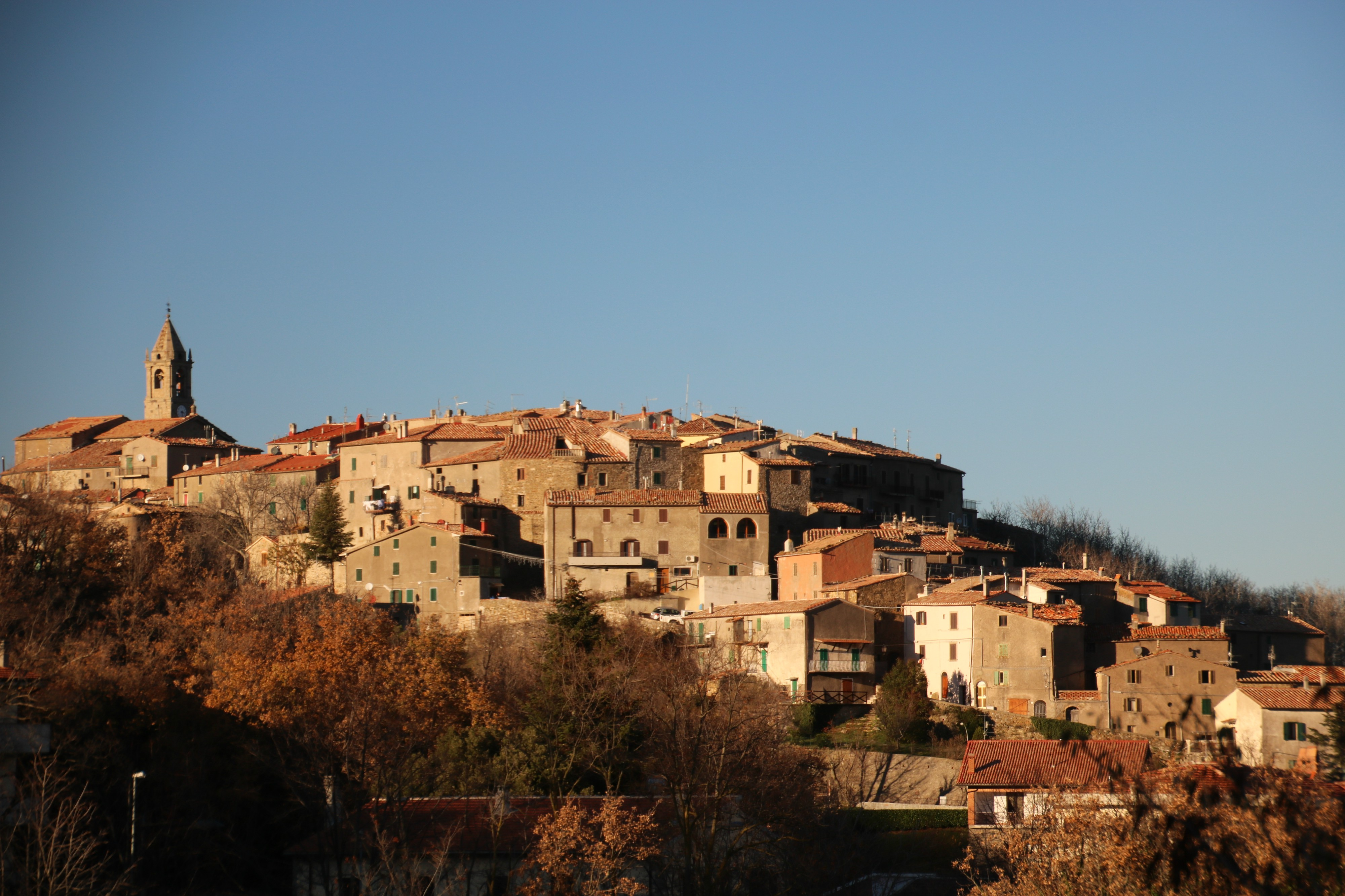 Veduta di Montelicello Amiata (Cinigiano)